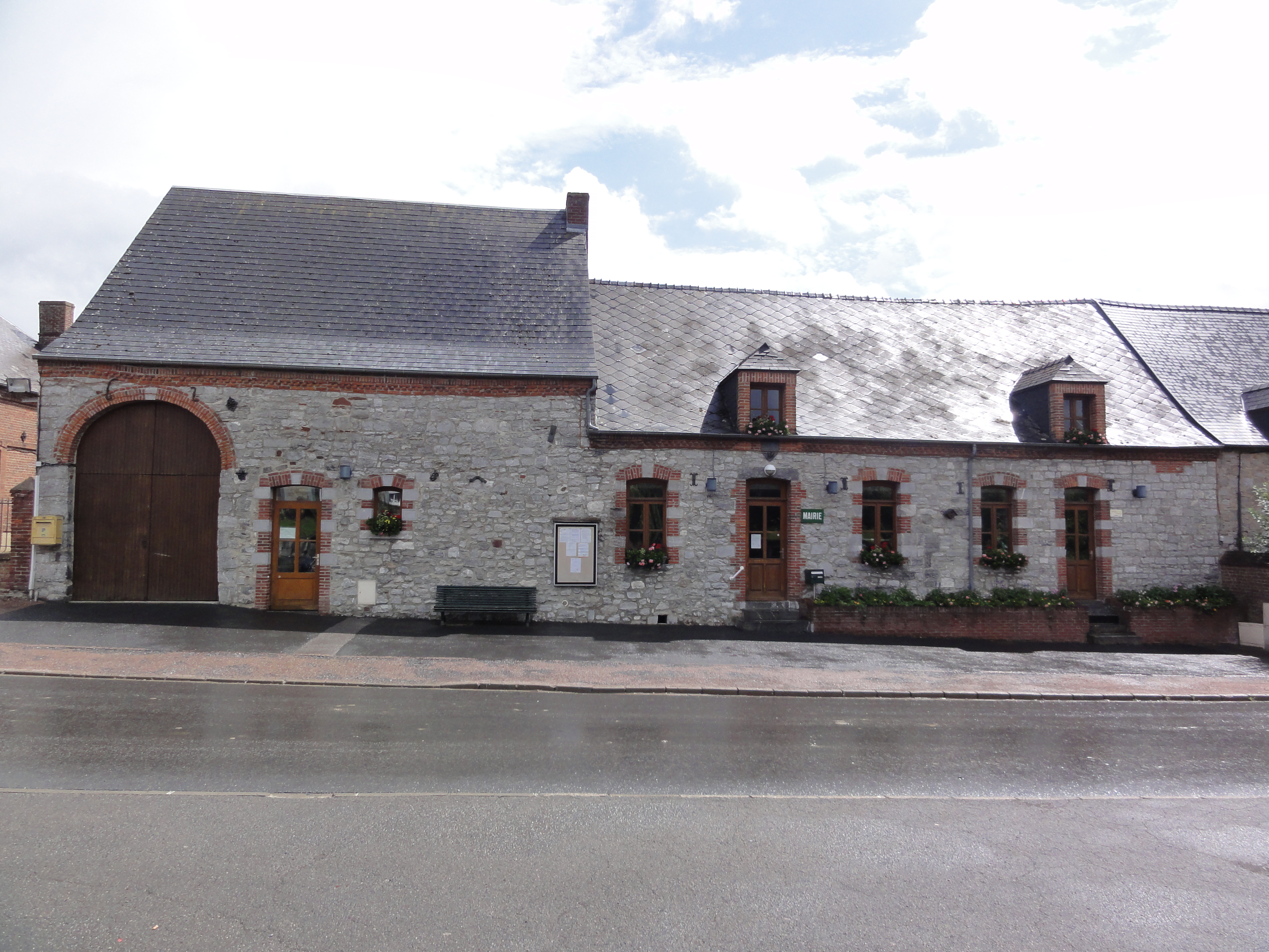 Féron (Nord, Fr) mairie